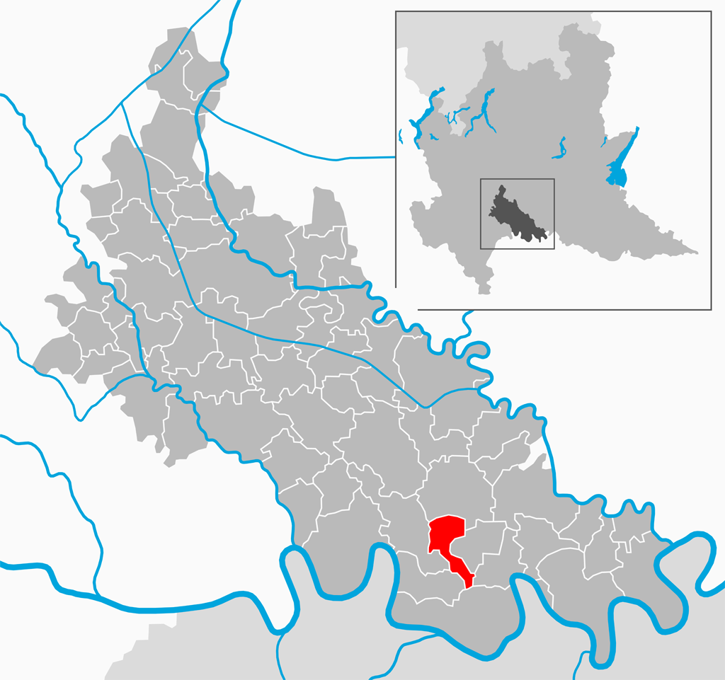 Il comune di Fombio nella provincia di Lodi